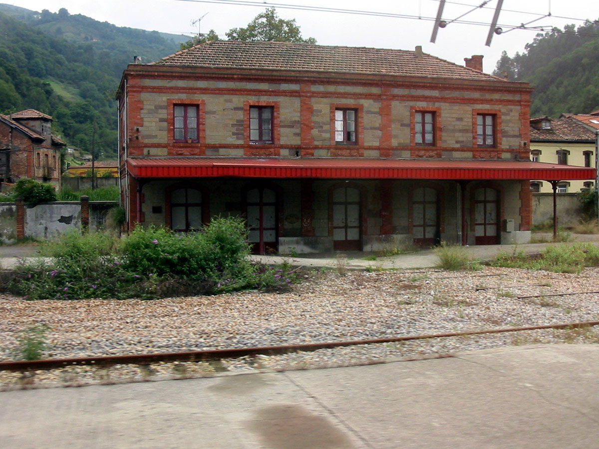 Antigua estación de Ablaña de RENFE en Mieres.